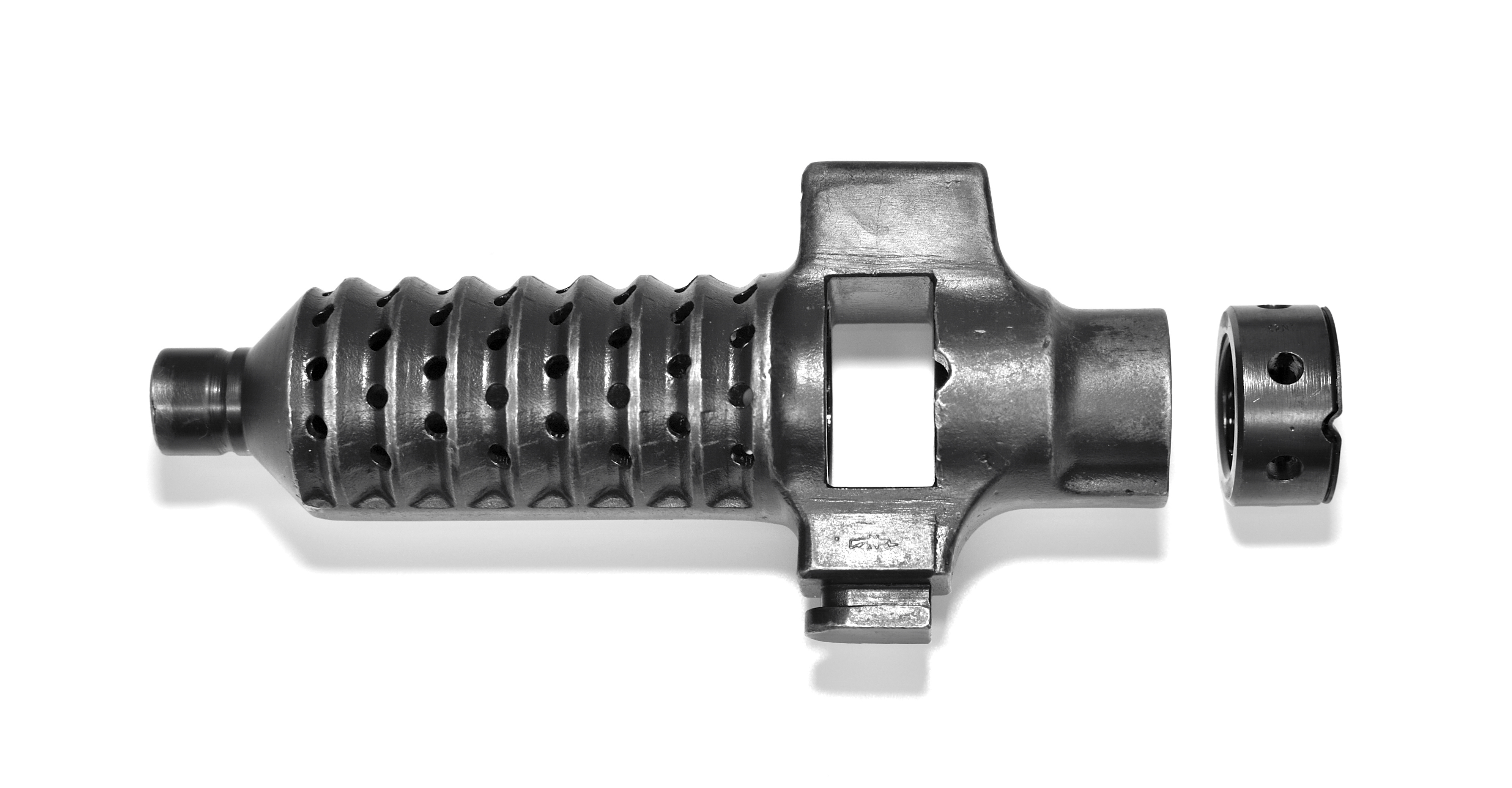 Frein de bouche du mousqueton à lunette 1955 (Zfk55)